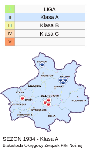 Jagiellonia w sezonie 1934 - mapa